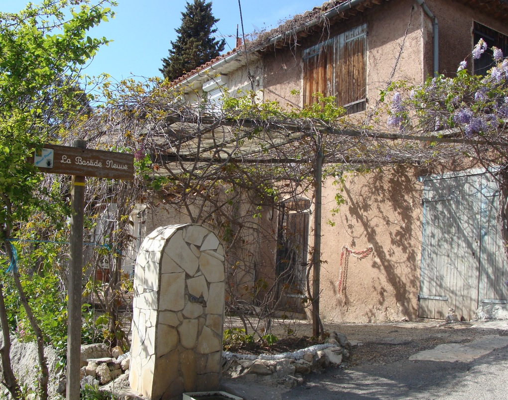 La Bastide neuve des Pagnol aux Bellons, état actuel